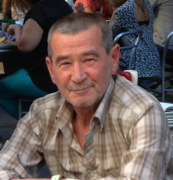 Ahmet Telli Ankara Kızılay'daki Leman Cafe'de